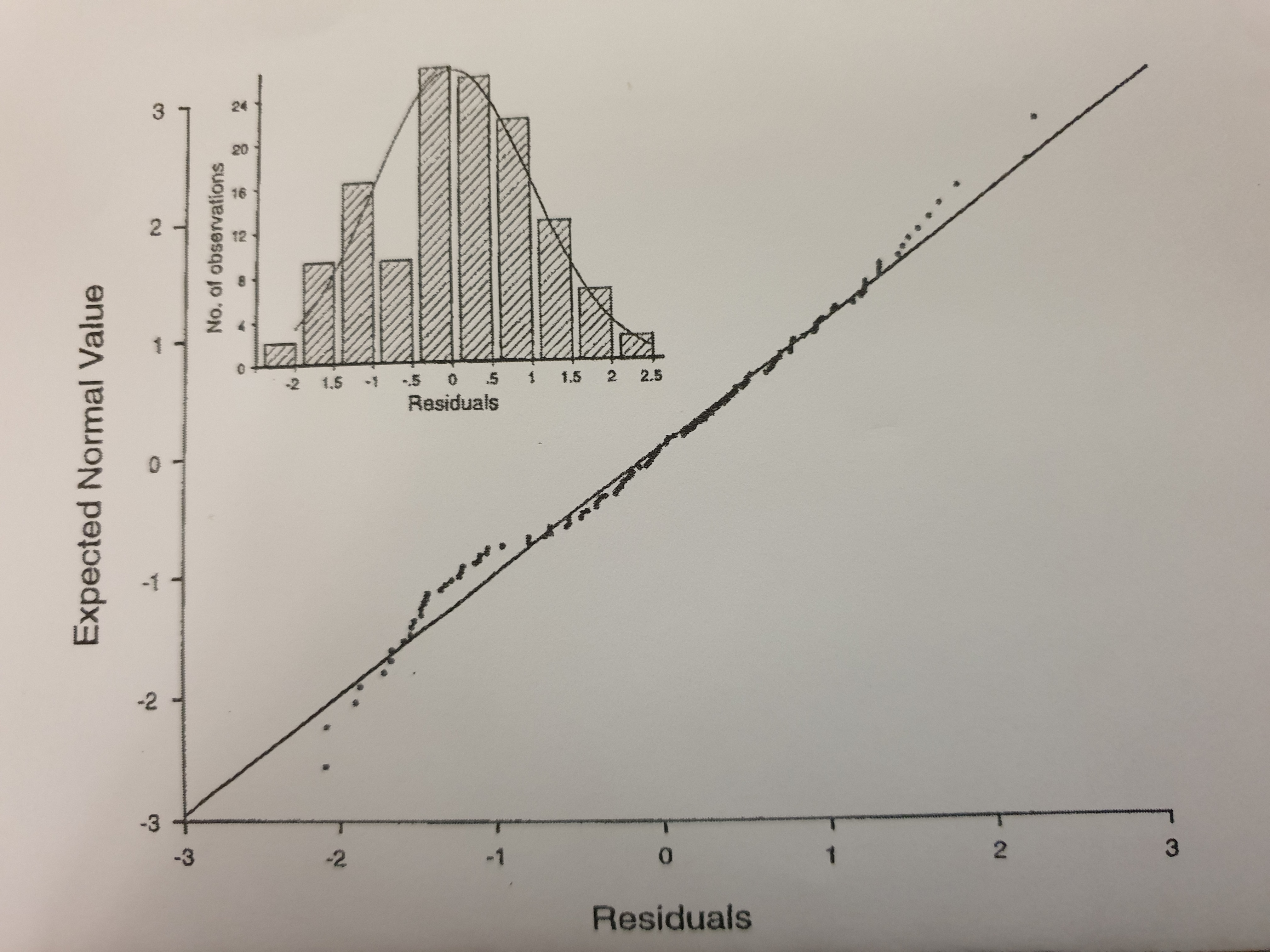 Residuals Scattering of the Seismic Intensity from Avni, R., 1999 Ph.D Thesis (Hebrew